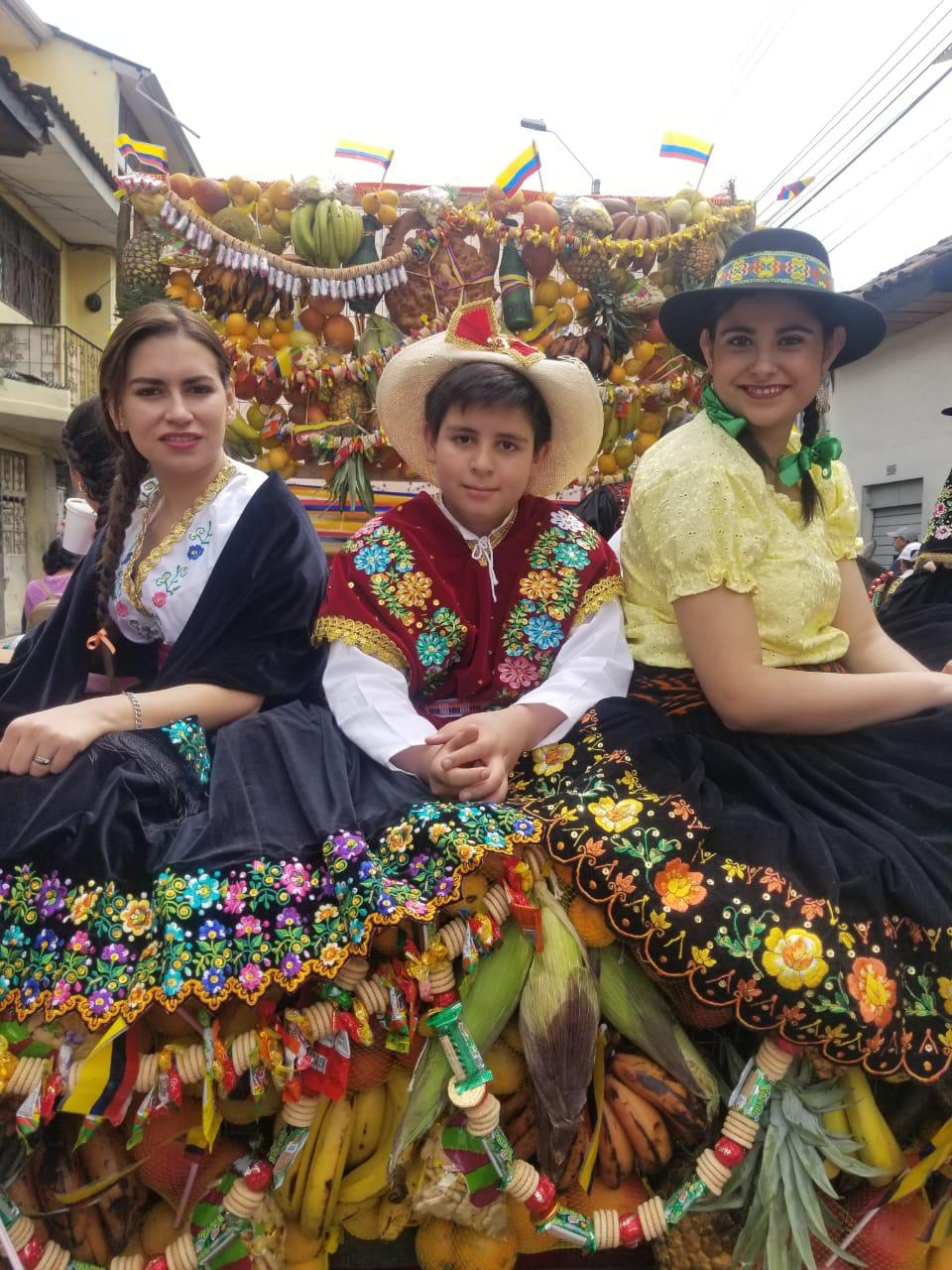 Carro alegórico con personajes del pase del niño